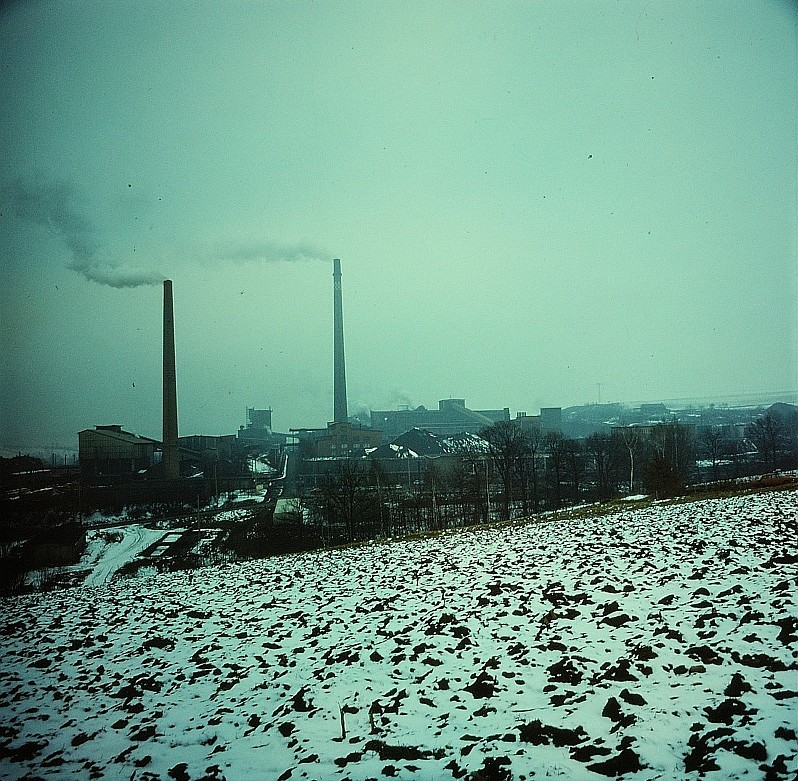 Original image description from the Deutsche FotothekMetallurge für Hüttentechnik, Nickelhütte